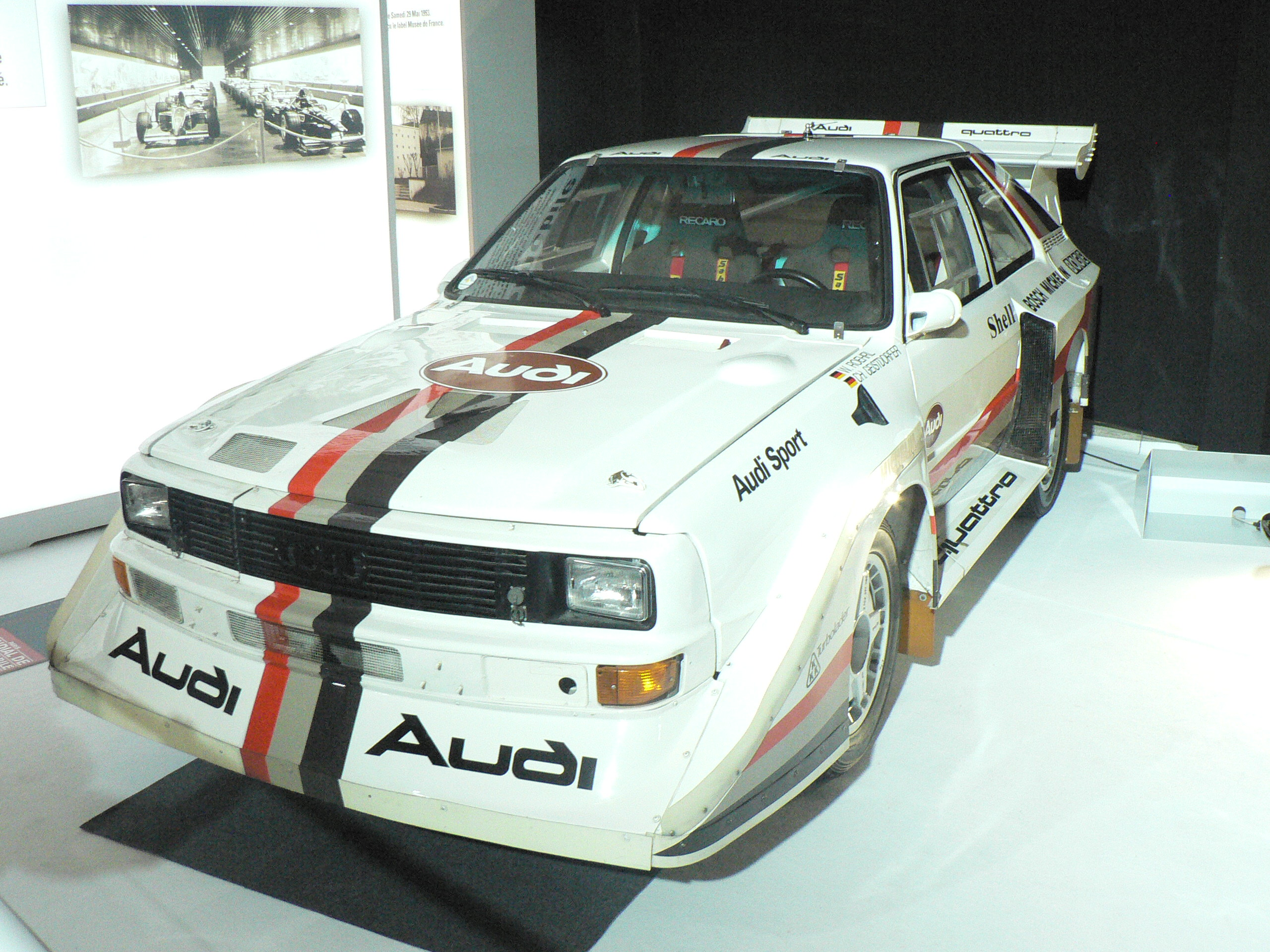 Mondial de l automobile de Paris (October 2006)